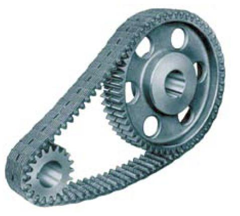 Silent chain